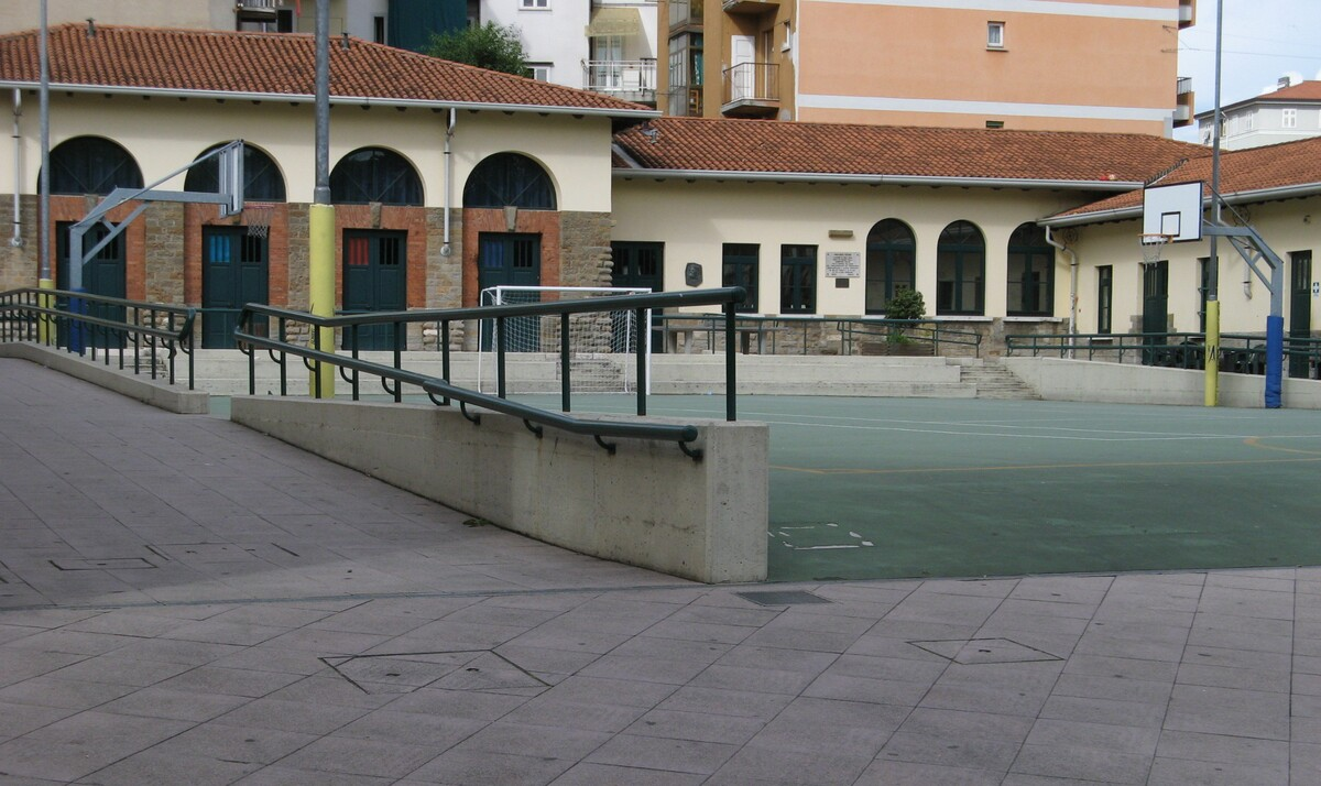 Ricreatorio R. Pitteri, Trieste